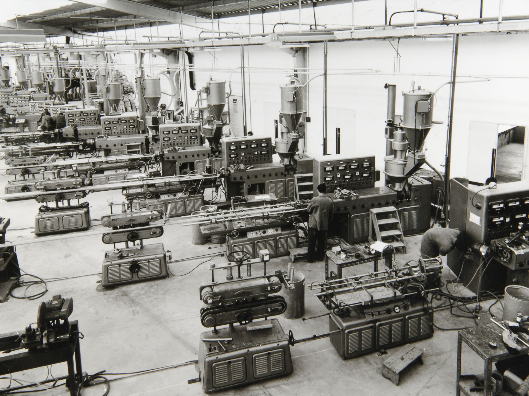 Usine d'extrusion - Archives Nicoll